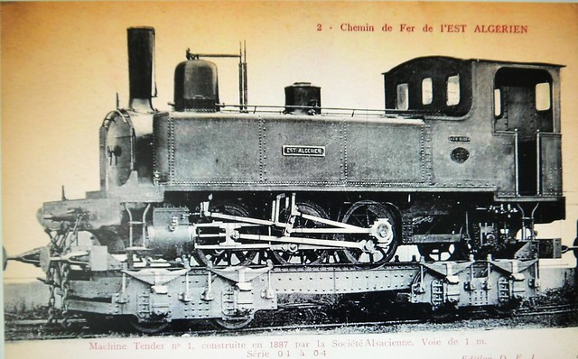 Chemin de Fer de l'Est Algerien - Machine Tender n° 1 construite en 1887 par la Societe Alsacienne. Voie de 1 m, Serie 0-1 a 0-4